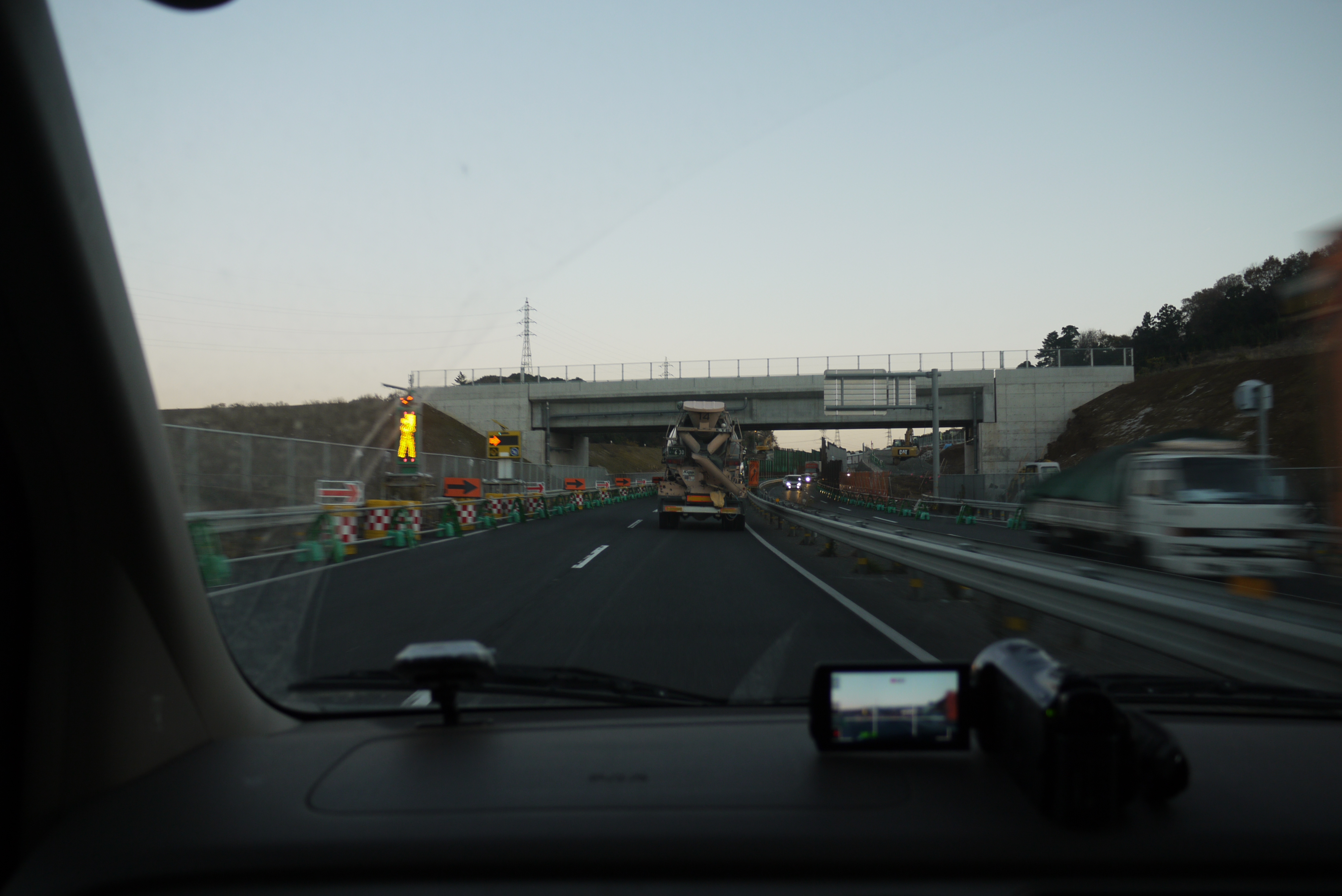 松江JCT工事現場(2010年12月4日)